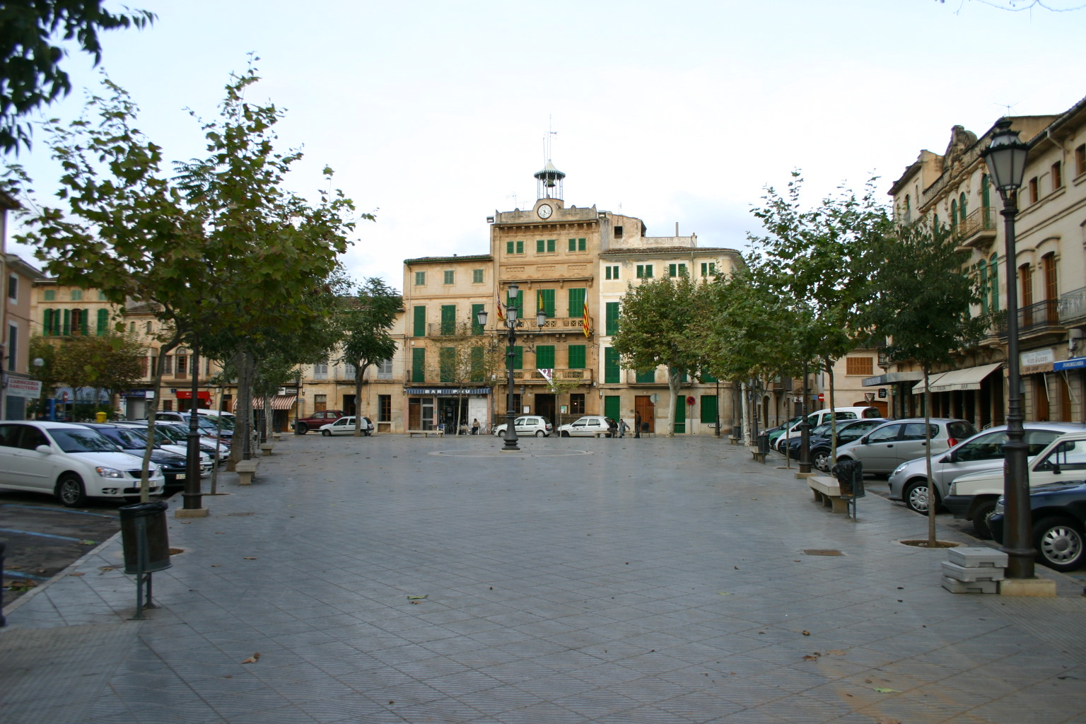 Autor: António M.L. Cabral; Camera: Canon EOS 300D com lentes Canon EFS 18-55mm; Data: 12-11-2005 Local: Llucmajor Plaça Espanya vor der Renovierung 2008